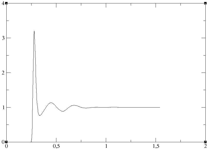 RDF 1000 molekula vode na 300K simuliranih u programskom paketu GROMACS.